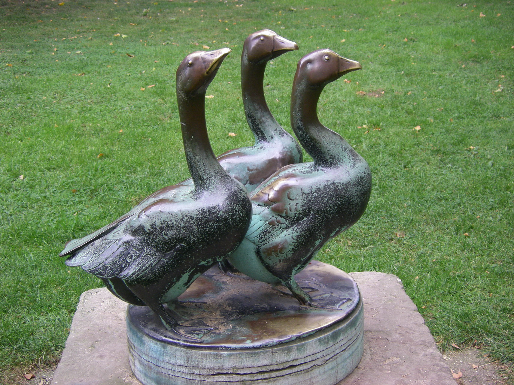 Skulptur Drei Gänse von Gustav Weidanz auf dem Rosa-Luxemburg-Platz in Halle (Saale)